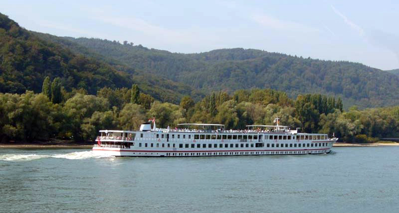 MS Alemannia